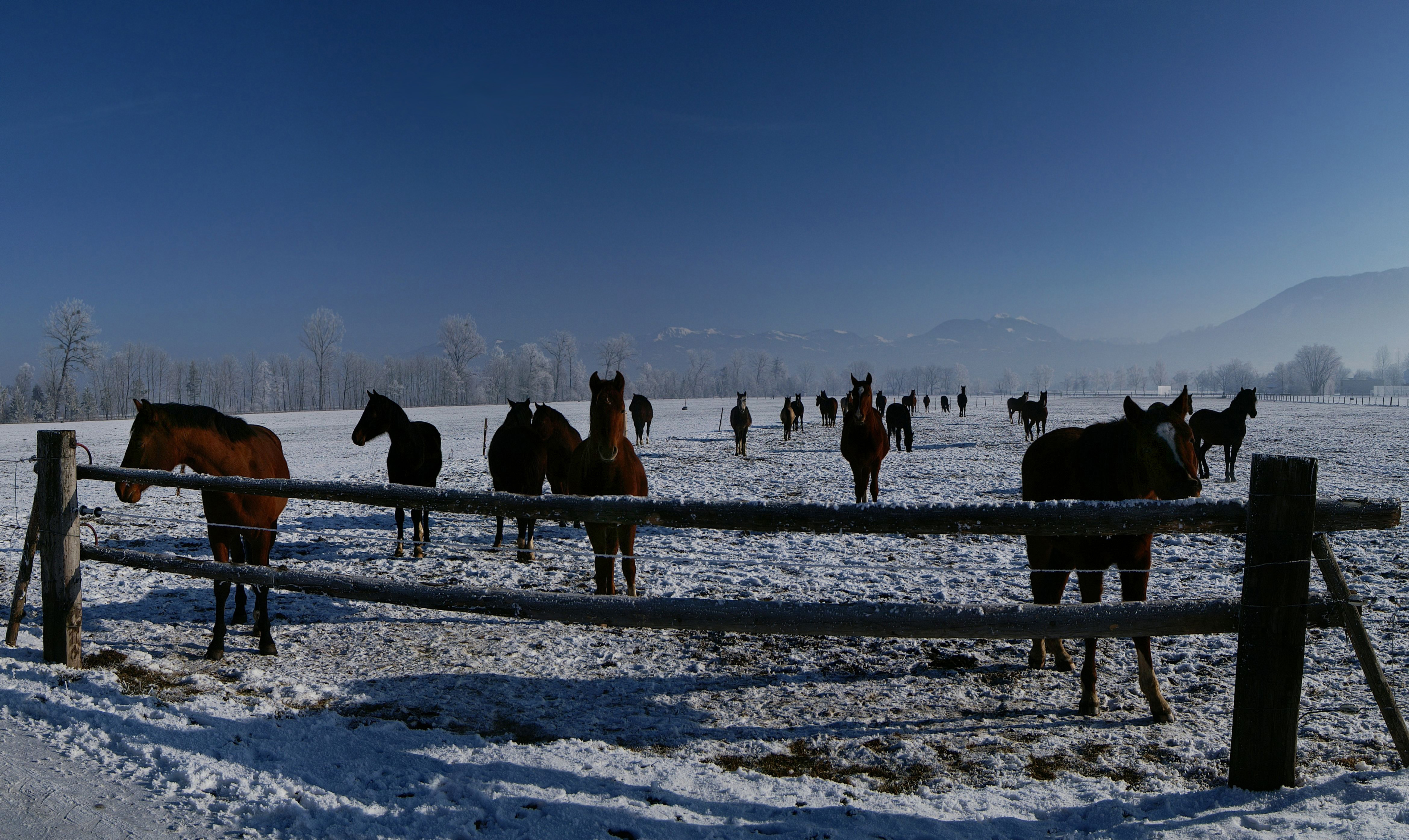 Raureif - Panorama mit 5 Bilder. Zwischen Haag und Sennwald eine Pferdeweide mit Jungtieren des Schweizer Warmblut im Rheintal. Im Hintergrund das Bregenzerwaldgebirge.